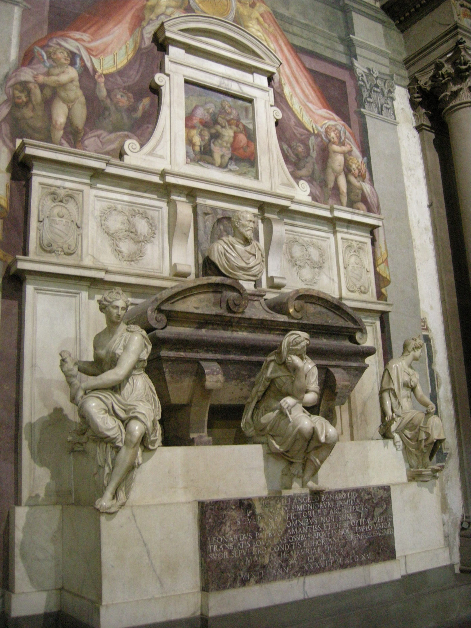 Tomba di michelangelo